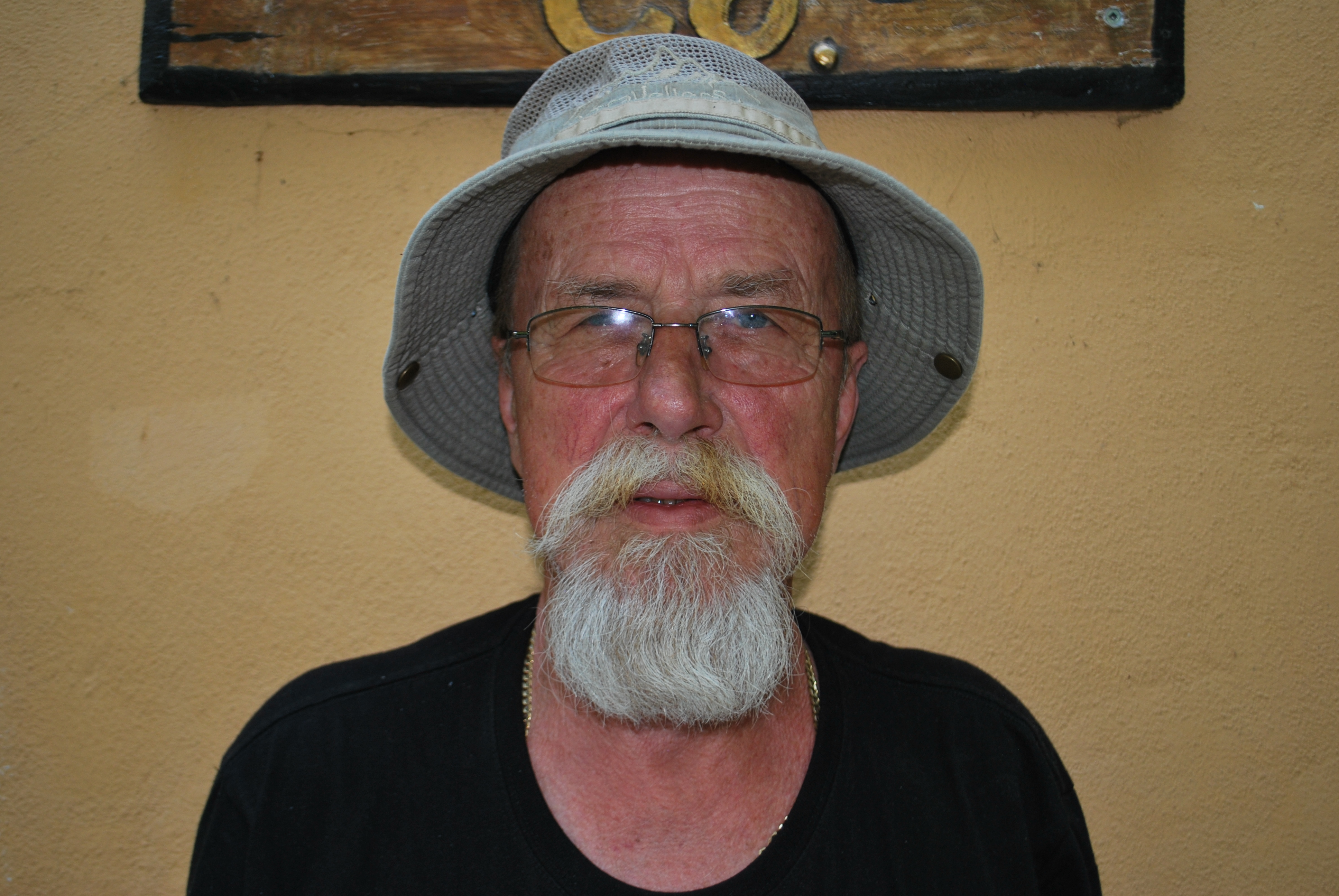 Vasja Ulrih, rojen 17. 4. 1946 v mestu Maribor (oče: Anton, mama Ela (dekliški priimek Letoja)). Akademski kipar - restavrator. Slika posneta pred njegovim ateljejem v mestu Ljubljana, Rimska cesta 24.